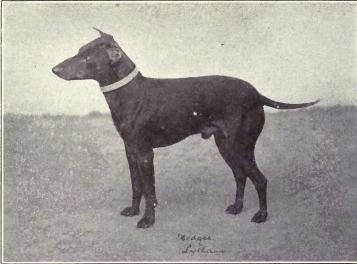 Manchester Terrier from 1915.